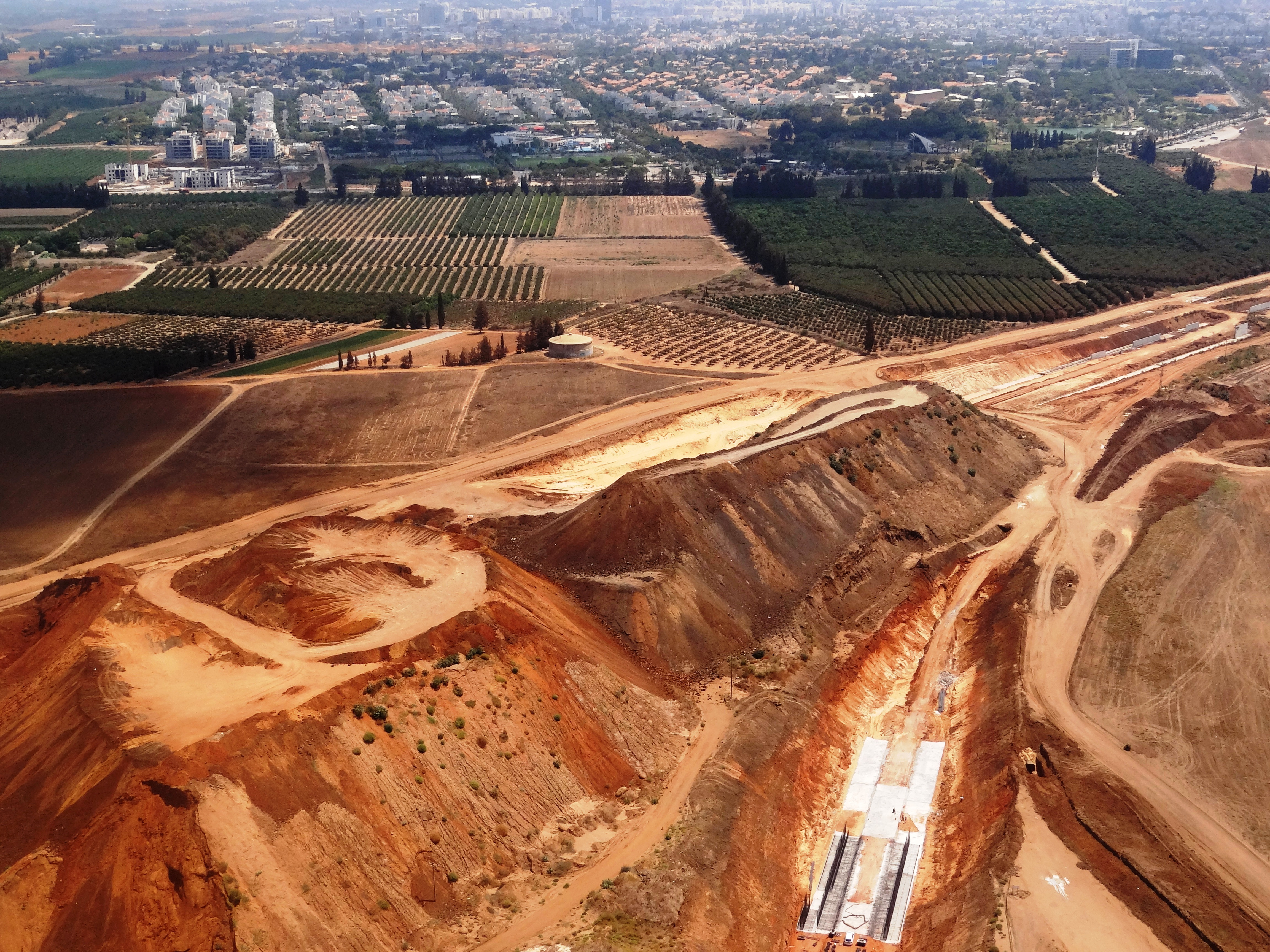 סלילת המשך כביש 531 מצפון לשדה תעופה הרצליה